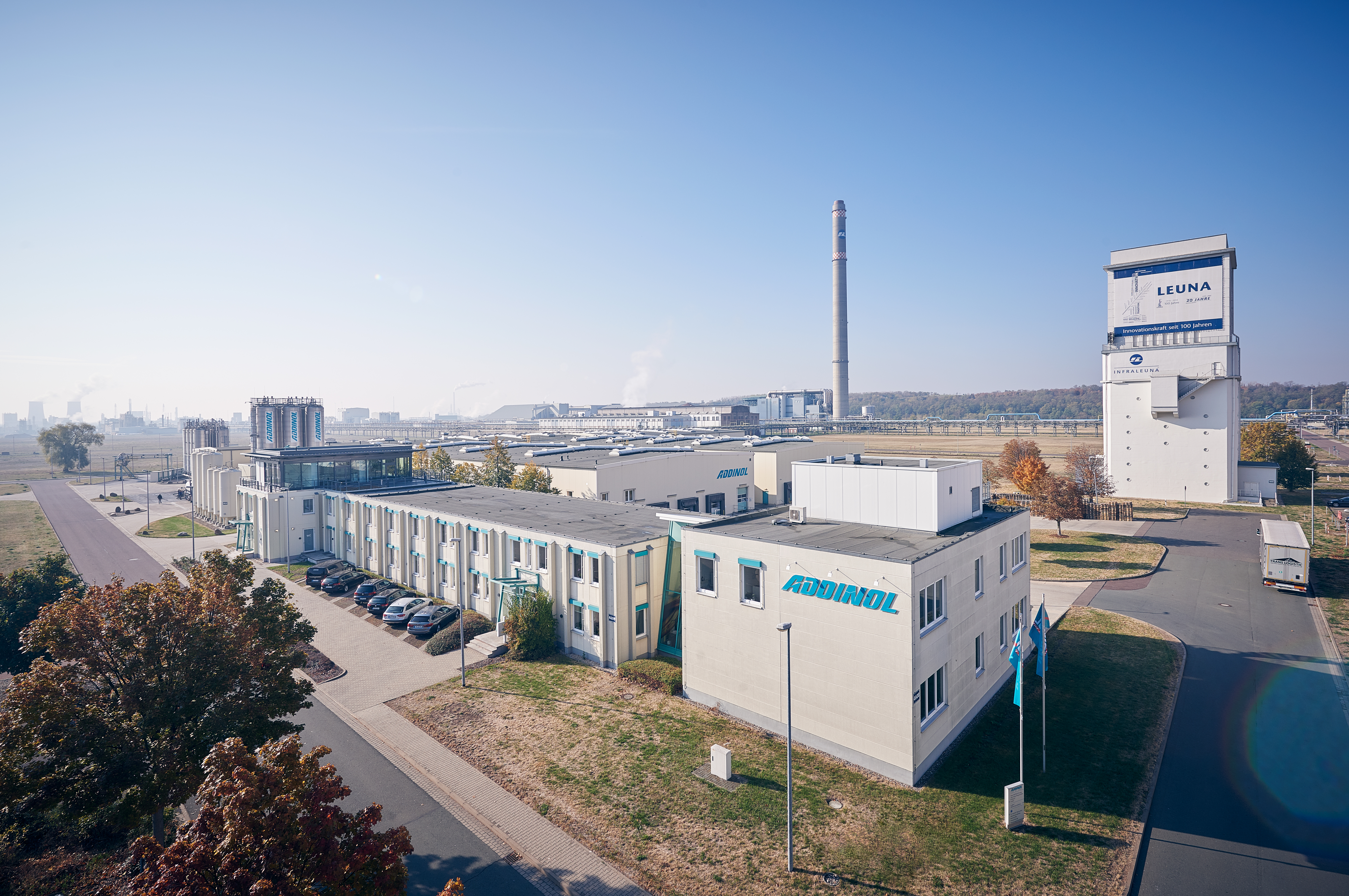 Außenaufnahme des ADDINOL-Werkes in Leuna